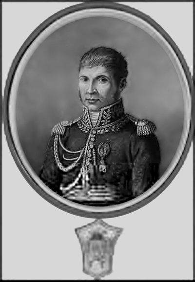 Général_Etienne_Radet